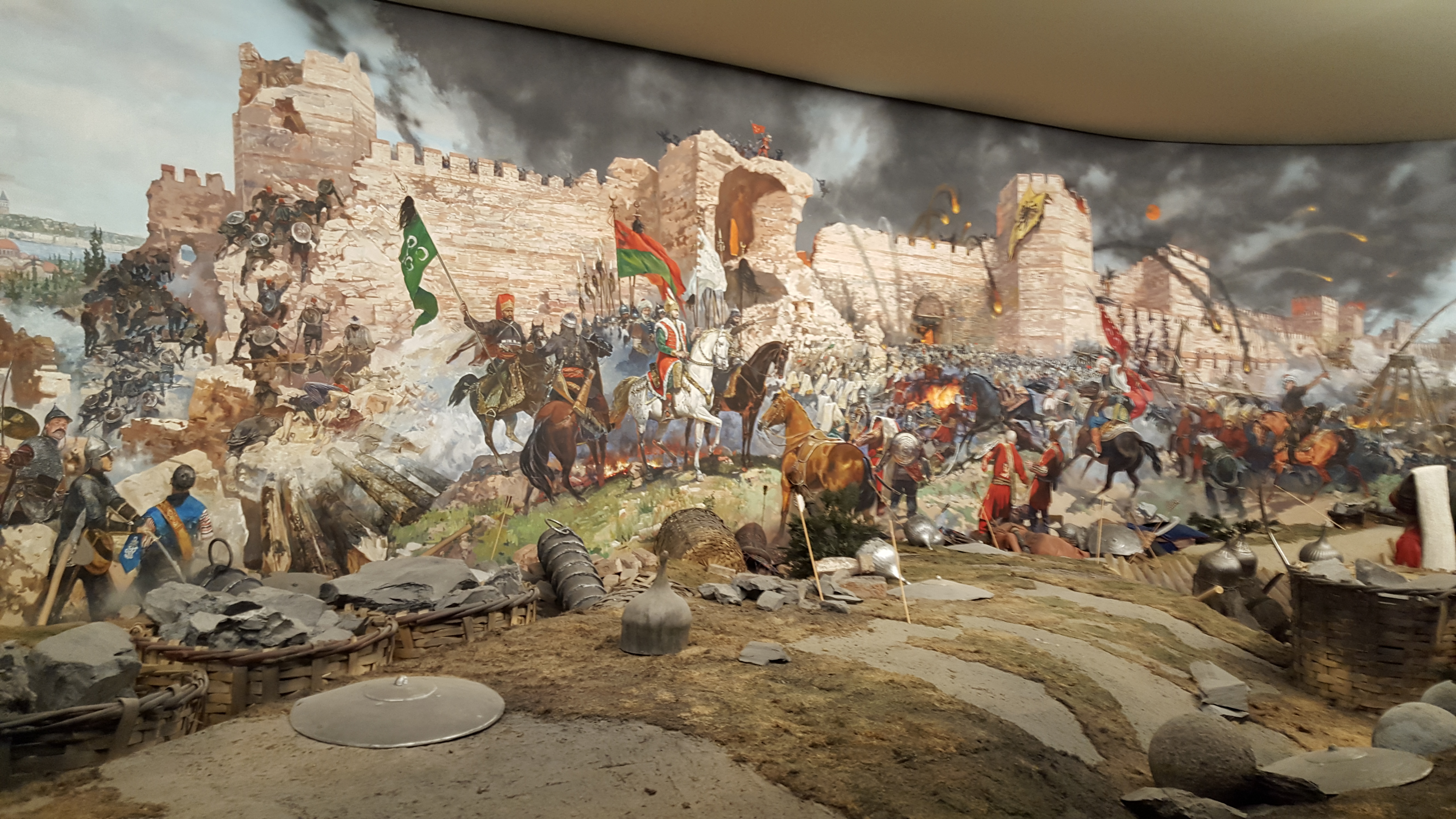 כיבוש איסטנבול - מייצג פנורמי במוזיאון הצבאי הטורקי הממוקם באיסטנבול